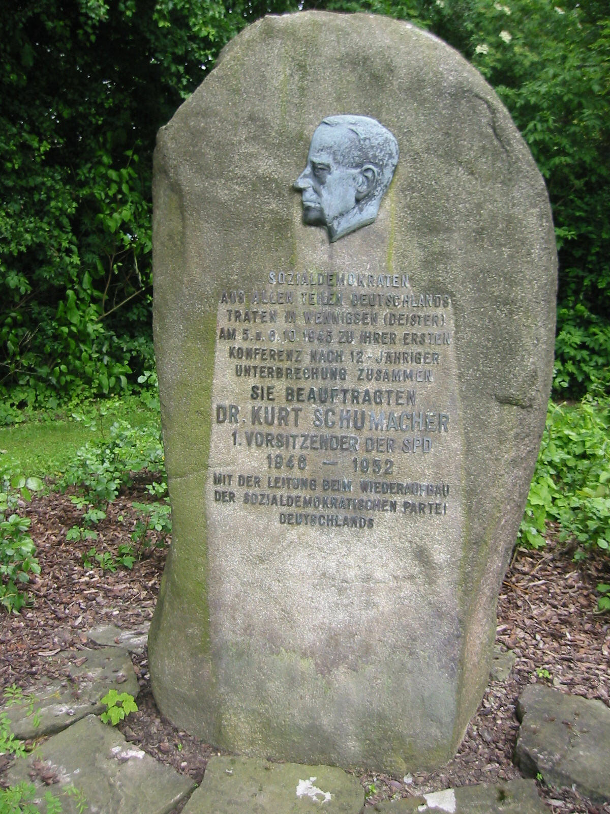 fotografiert am 13.6.2006 in Wennigsen Canon Digital Ixus 300; source is own work; 1024 * 680 pixel Der Text des Denkmals lautet: SOZIALDEMOKRATEN AUS ALLEN TEILEN DEUTSCHLANDS TRATEN IN WENNIGSEN (DEISTER) AM 5. - 8.10. 1945 ZU IHRER ERSTEN KONFERENZ NACH 12-JÄHRIGER UNTERBRECHUNG ZUSAMMEN. SIE BEAUFTRAGTEN DR. KURT SCHUMACHER 1. VORSITZENDER DER SPD 1946 - 1952 MIT DER LEITUNG BEIM WIEDERAUFBAU DER SOZIALDEMOKRATISCHEN PARTEI DEUTSCHLANDs.